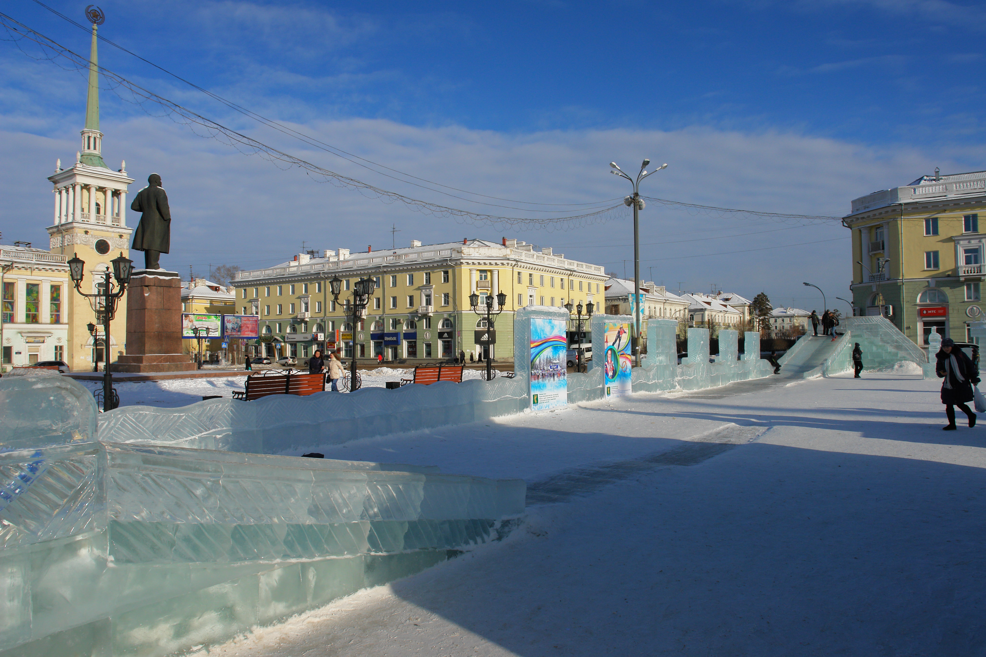 Ледовый городок.Ангарск2014.